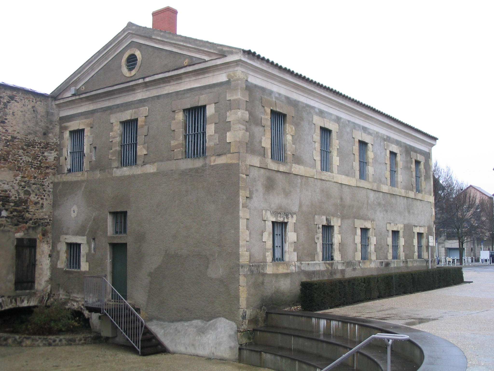 Ancienne prison des femmes de Cusset(France). Previous women prison of Cusset.